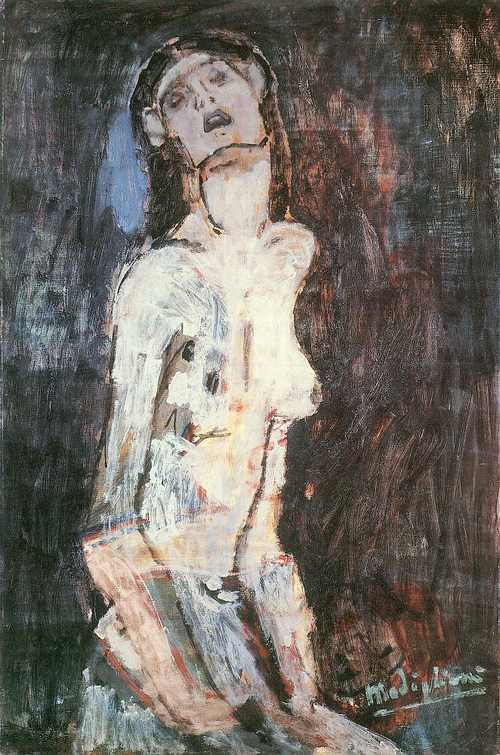 Leidender Aktlabel QS:Lde,"Leidender Akt"